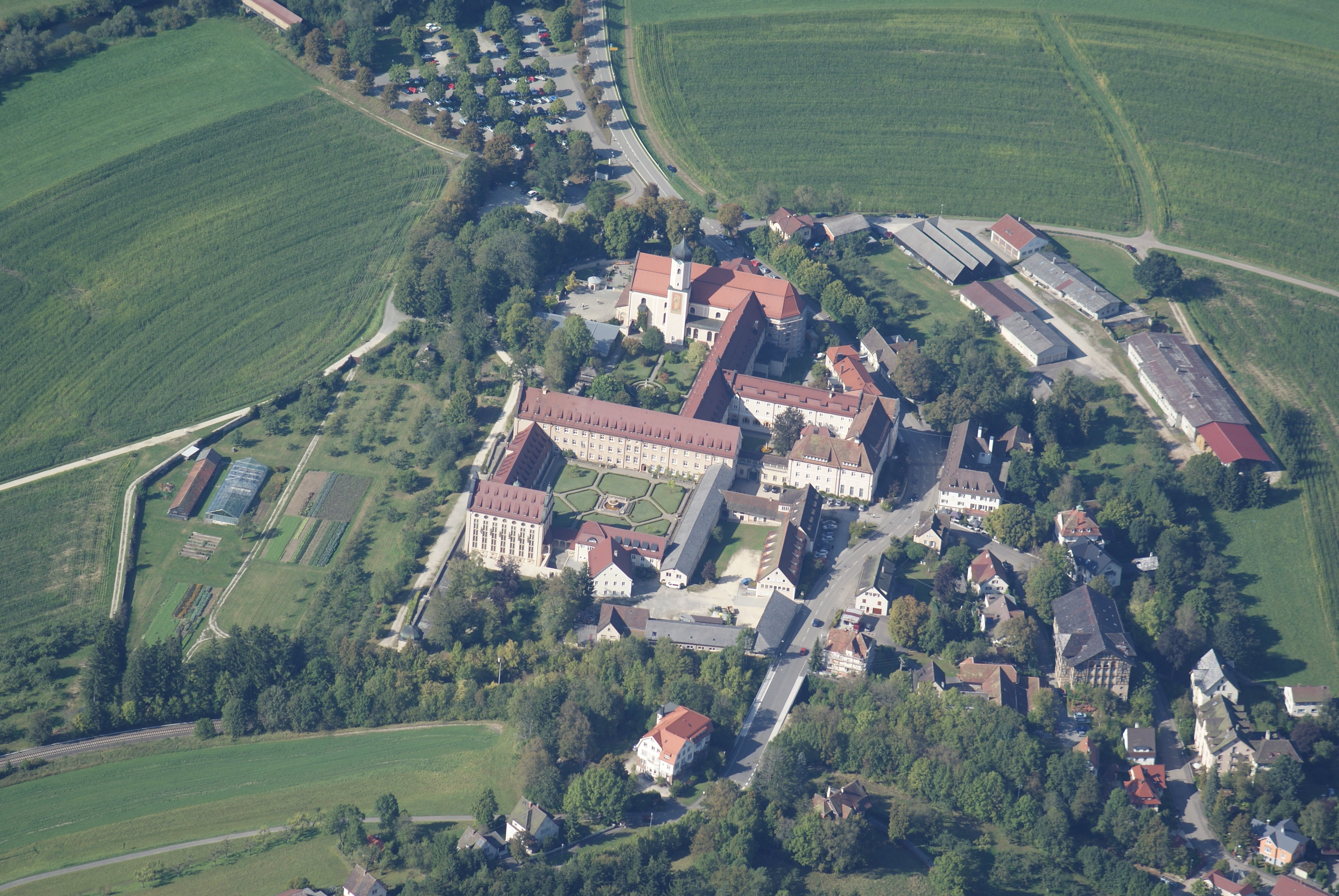 Kloster Beuron, Donautal, Luftbild